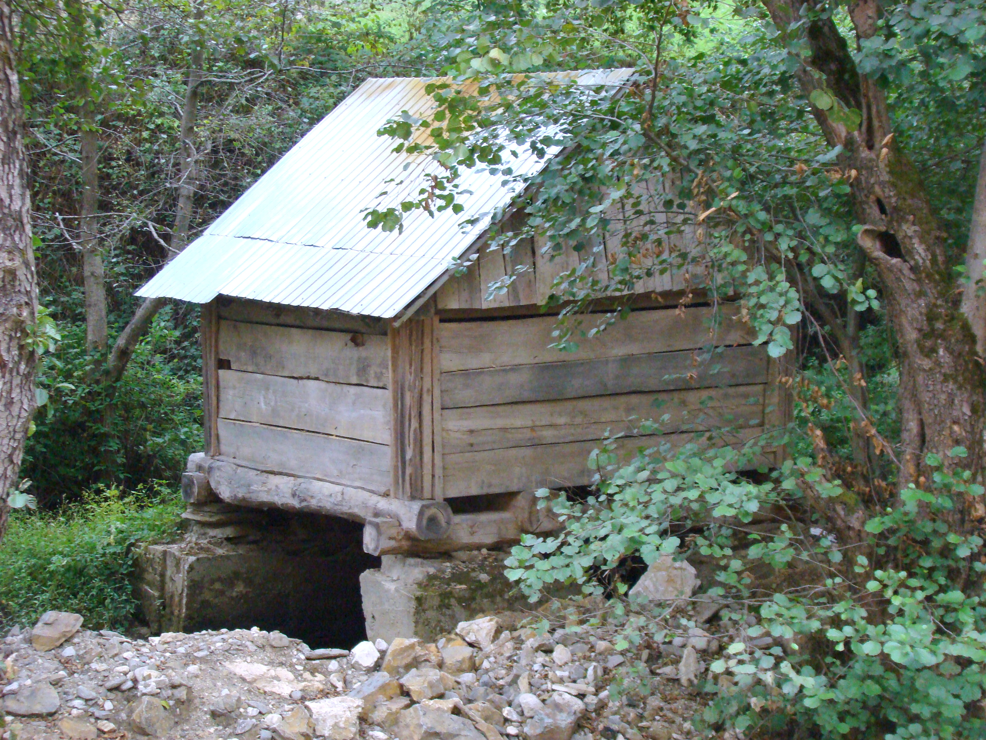 Ansamblu de mori din Mehadica, sat Mehadica; comuna Mehadica